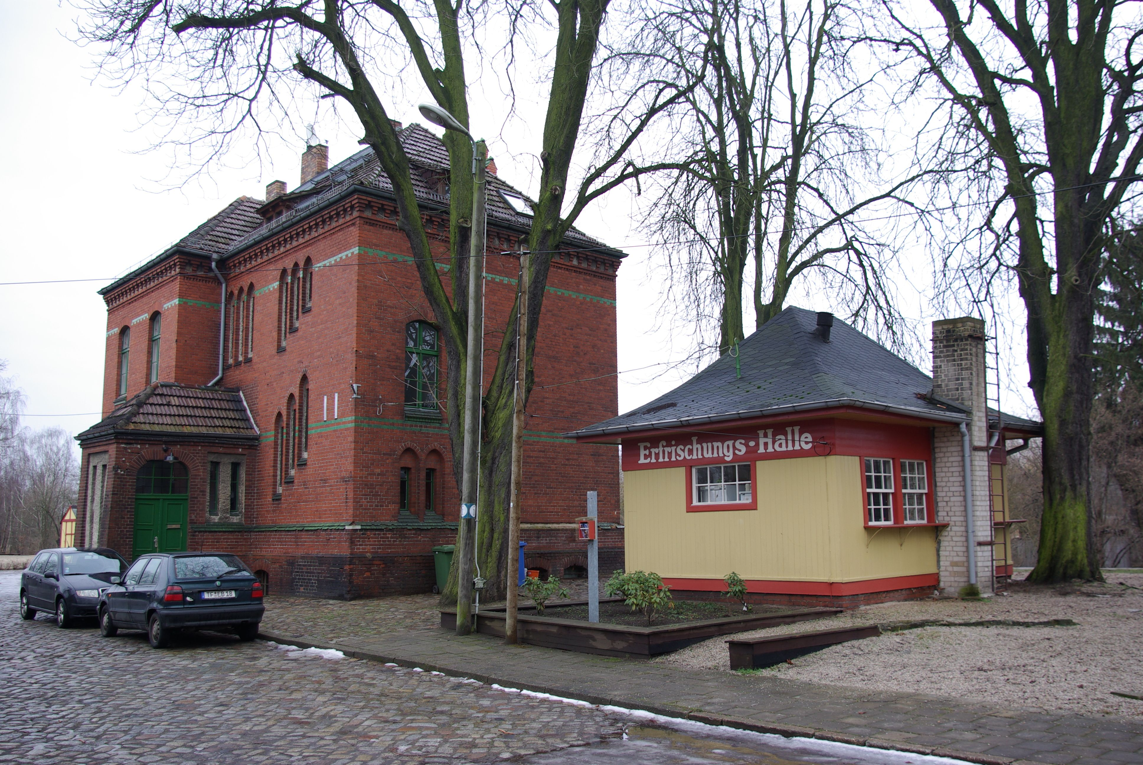 Am Mellensee Ortsteil Mellensee in Brandenburg. Der Bahnhof liegt an einer ehemaligen Militärbahnstrecke. Heute ist der Bahnhof Startbahnhof für Fahrten mit der Draisine (geotags in den exif-daten).